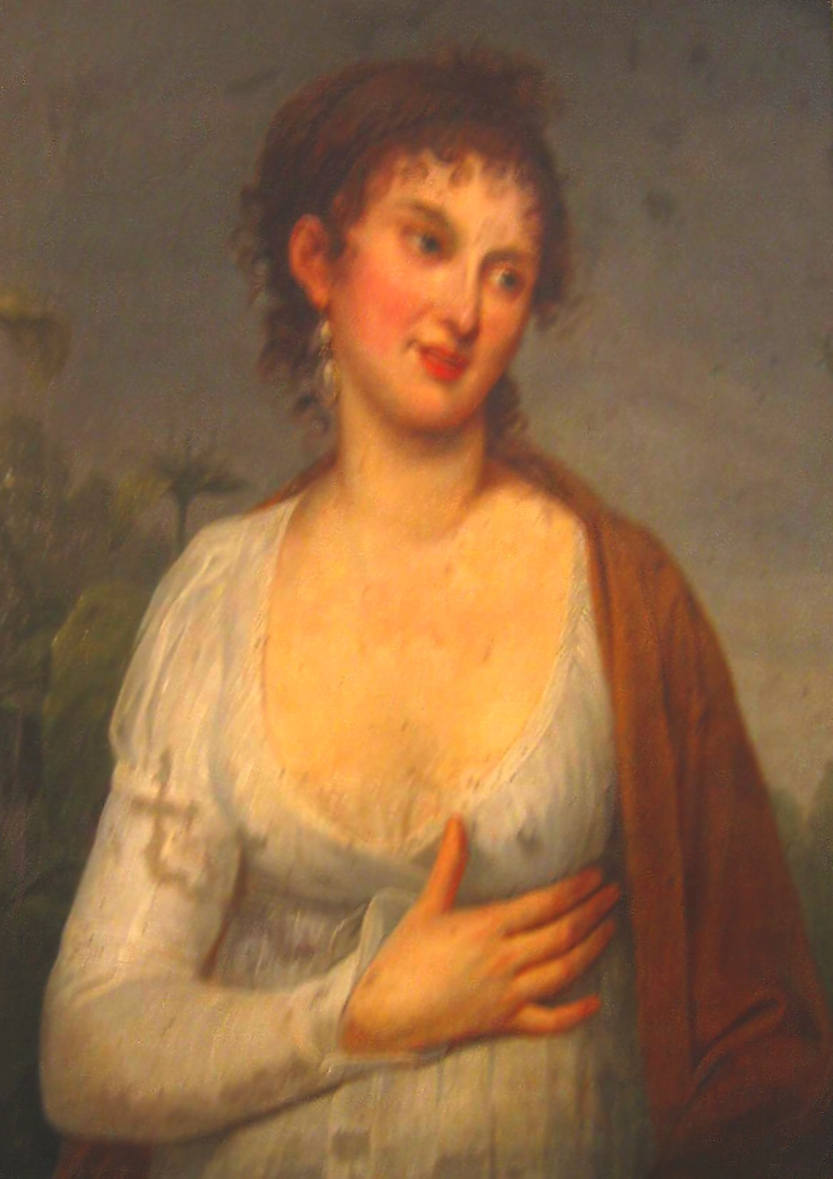 Maria Walewska anonymous portrait before 1817 Image taken by User:Mathiasrex Maciej Szczepańczyk